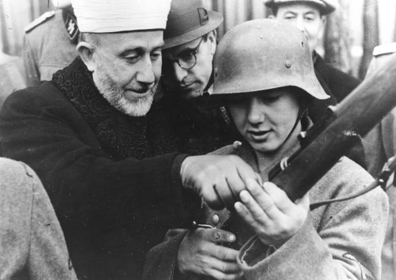 Der Großmufti von Jerusalem bei den bosnischen Freiwilligen der Waffen-SS, Nov. 43 Der Großmufti Amin al Husseini überzeugt sich von der Ausbildung am Gewehr.